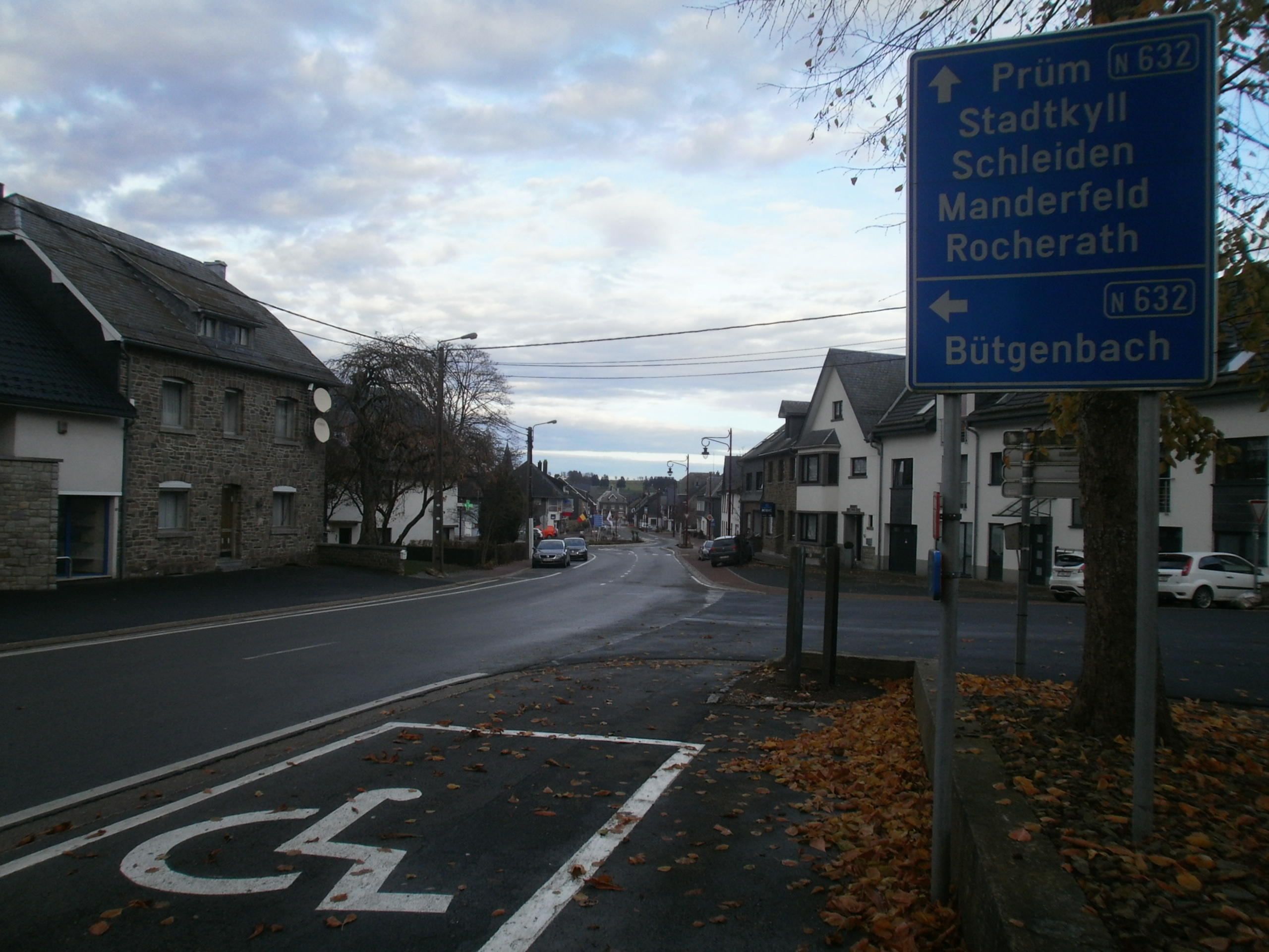 Morsheki ja Am Marktplatzi tänavate ristmik, nov. 2014, vaade kirdesse.